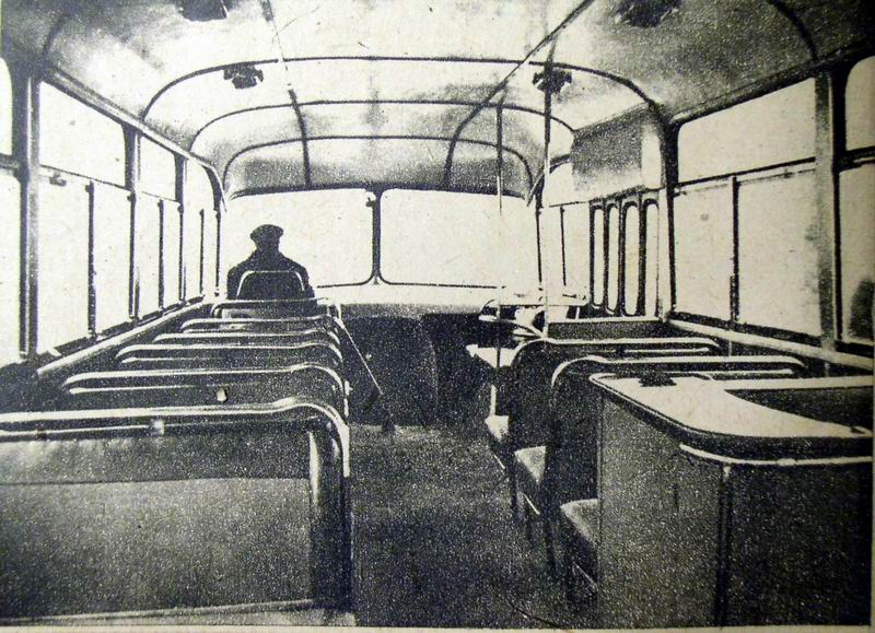 Interiorul autobuzului Mao Tse Dong